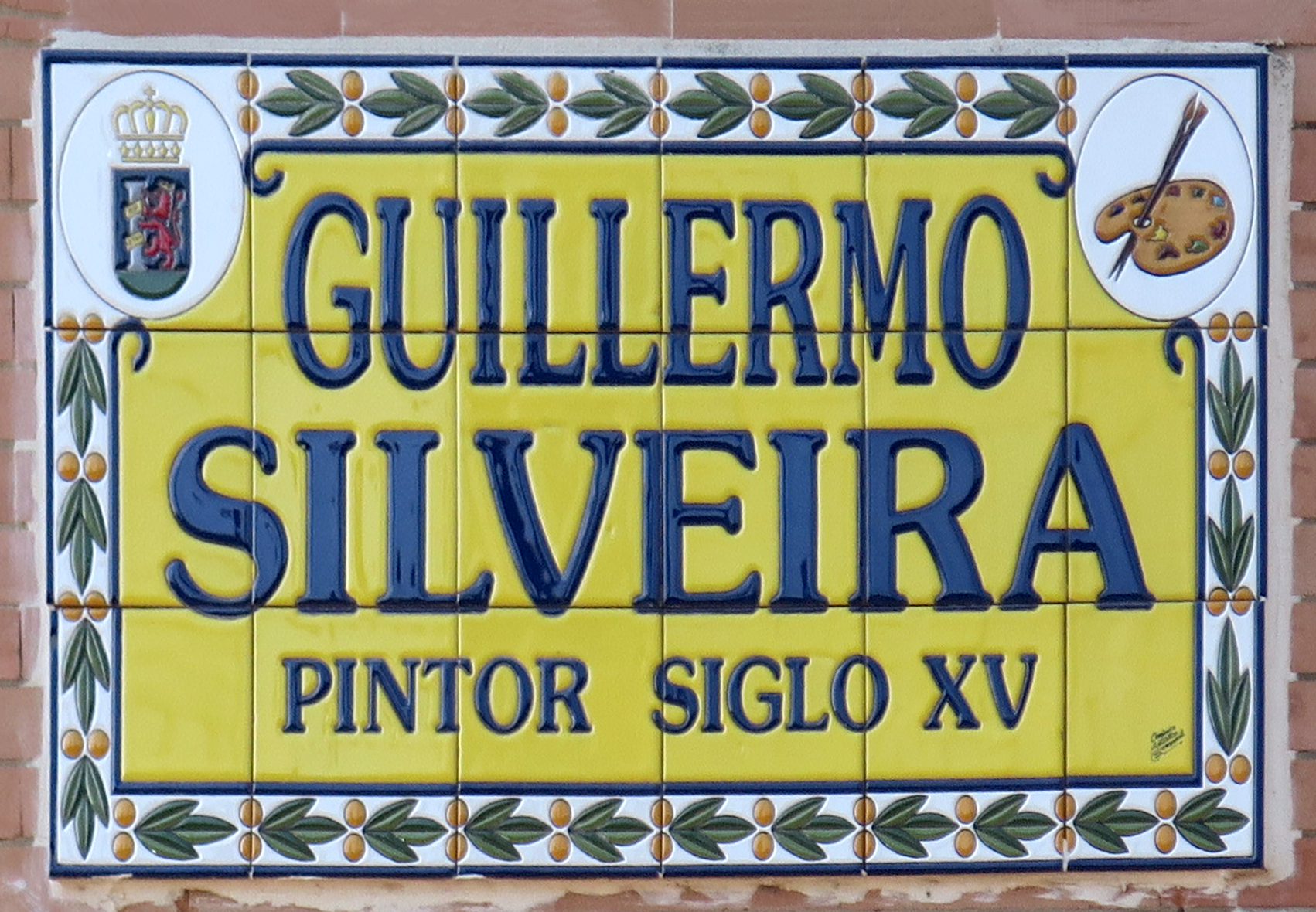 Badajoz. Placa identificativa de la calle Guillermo Silveira.